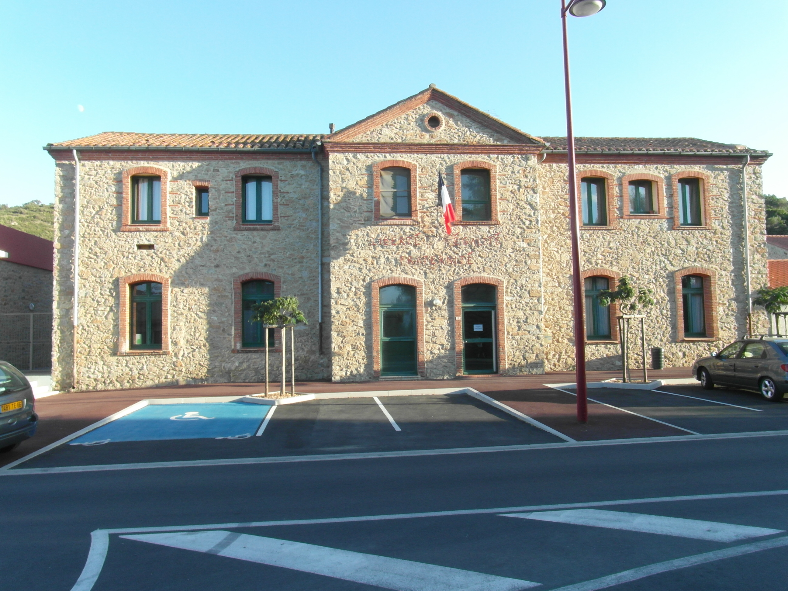 L'école (et ancienne mairie) de Corbère-les-Cabanes